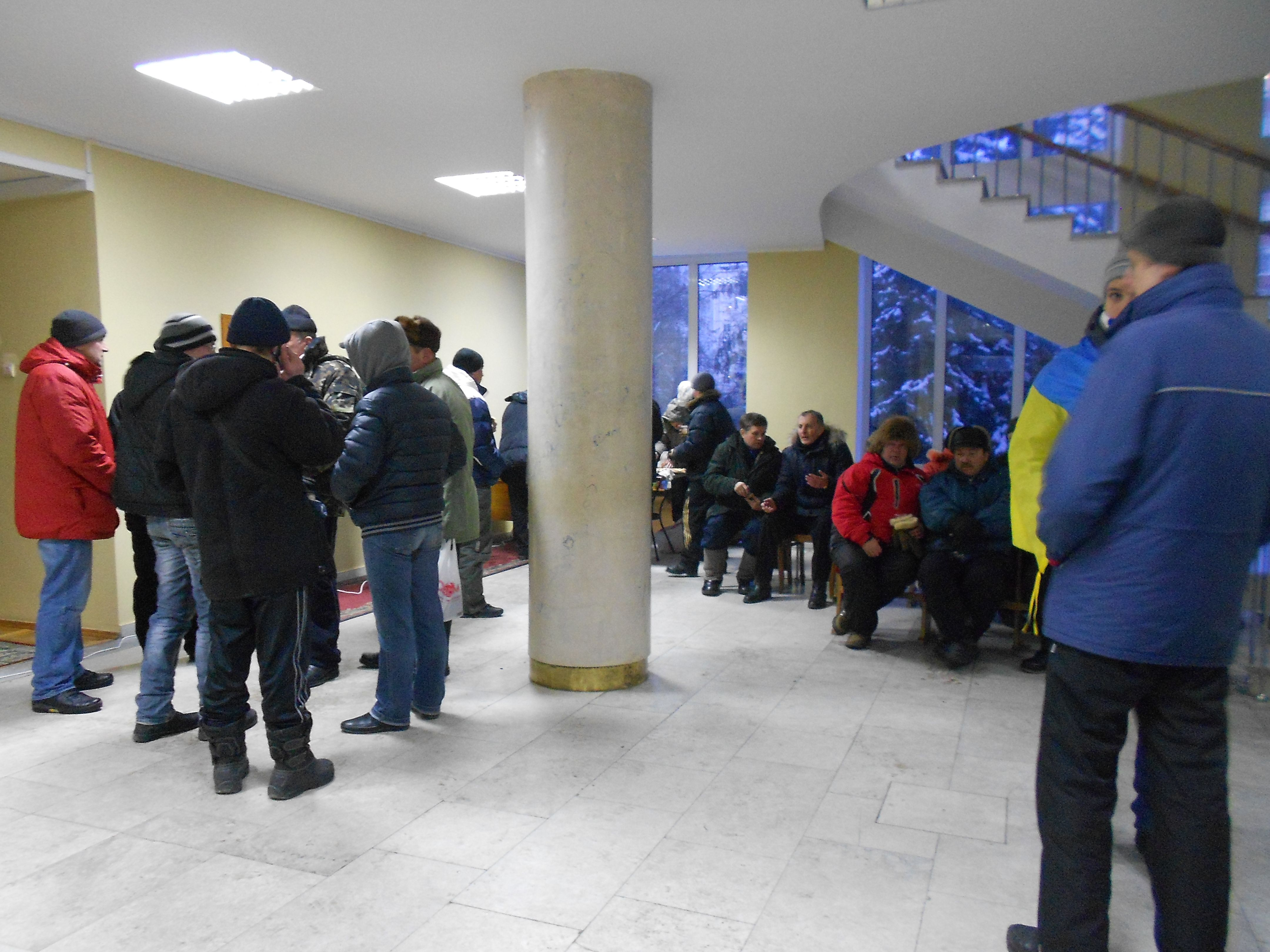 Чернігівська обласна рада 27 січня 2014 року. Всередині прибічники Євромайдану.